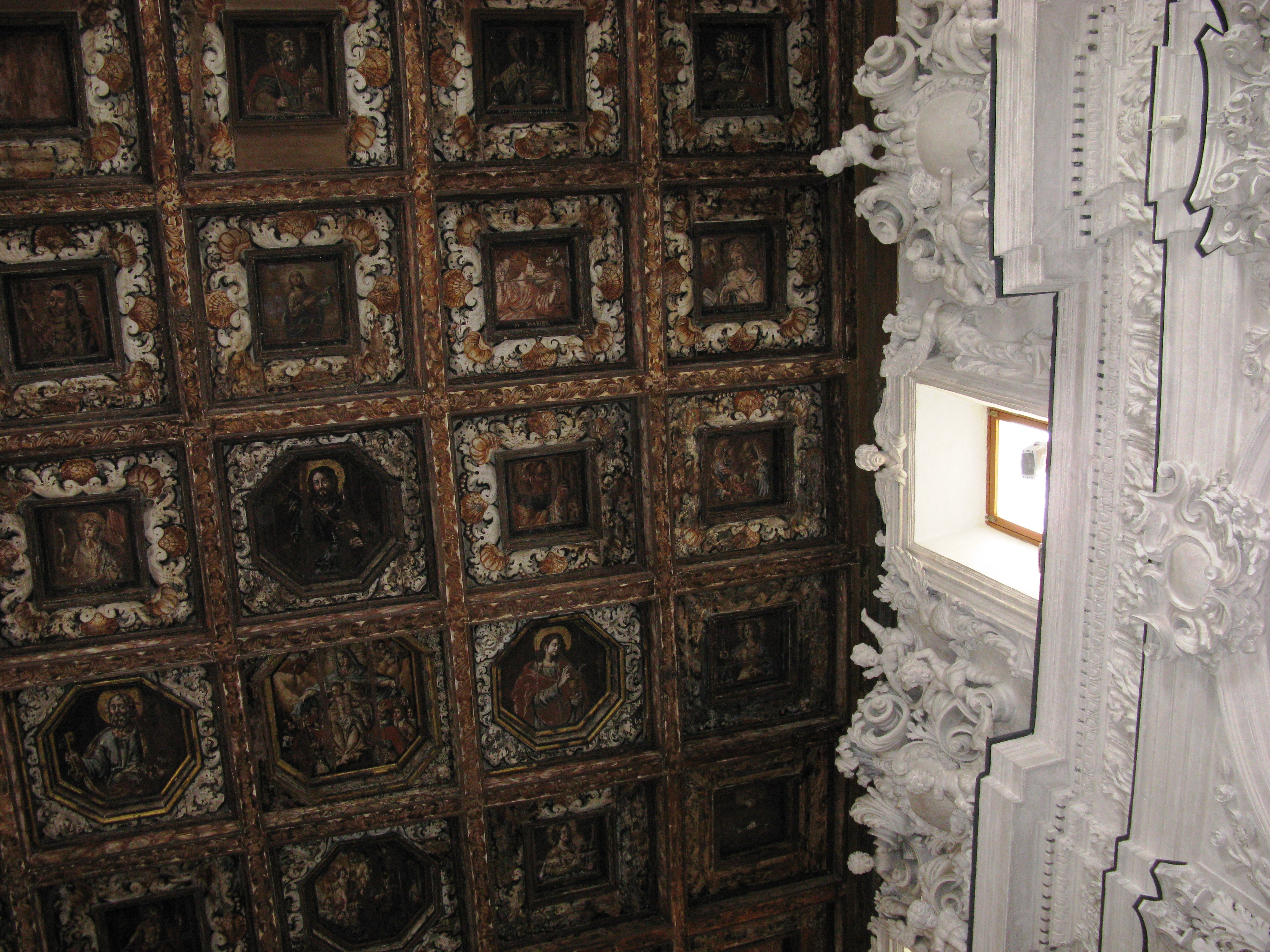 Soffitto a cassettoni della chiesa del Santissimo Rosario di Favara.